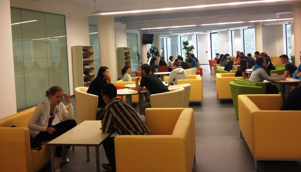 Relaxační prostory v Univerzitní knihovně ZČU v Plzni.